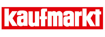 Kaufmarkt